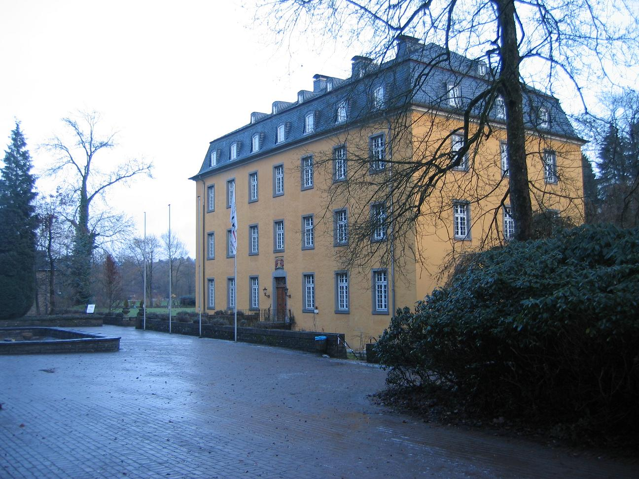 Herrenhaus von Schloss Heiligenhoven, Nordansicht